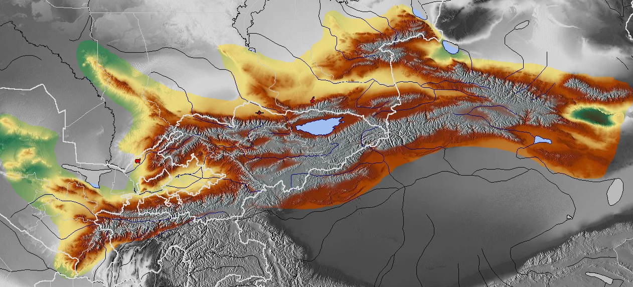 Tian Shan, Tian mendiak mendilerroa edo mendi zerutiarretako mapa.